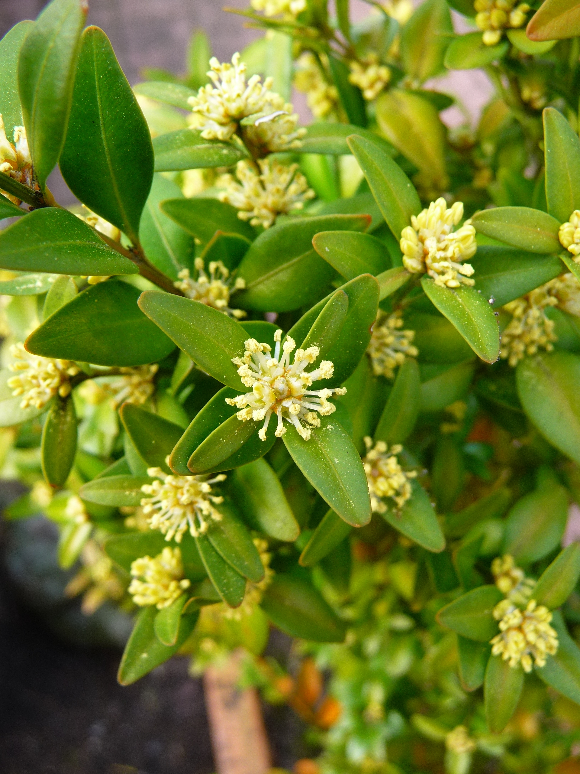 Gewöhnlicher Buchsbaum (Buxus sempervirens) mit Blütenknäuel